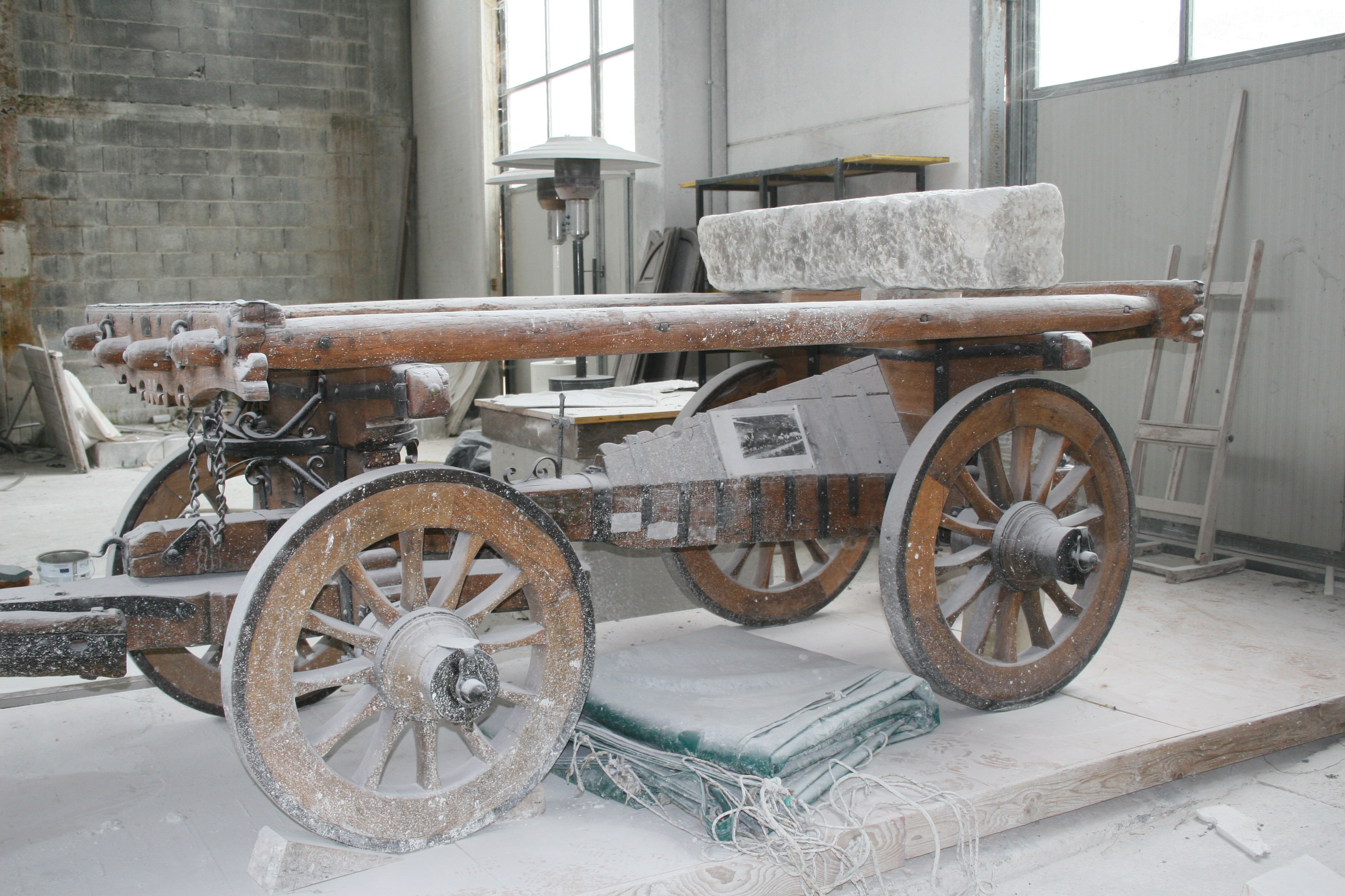 Präsentations-Ochsenkarren zum Steintransport in Carrara